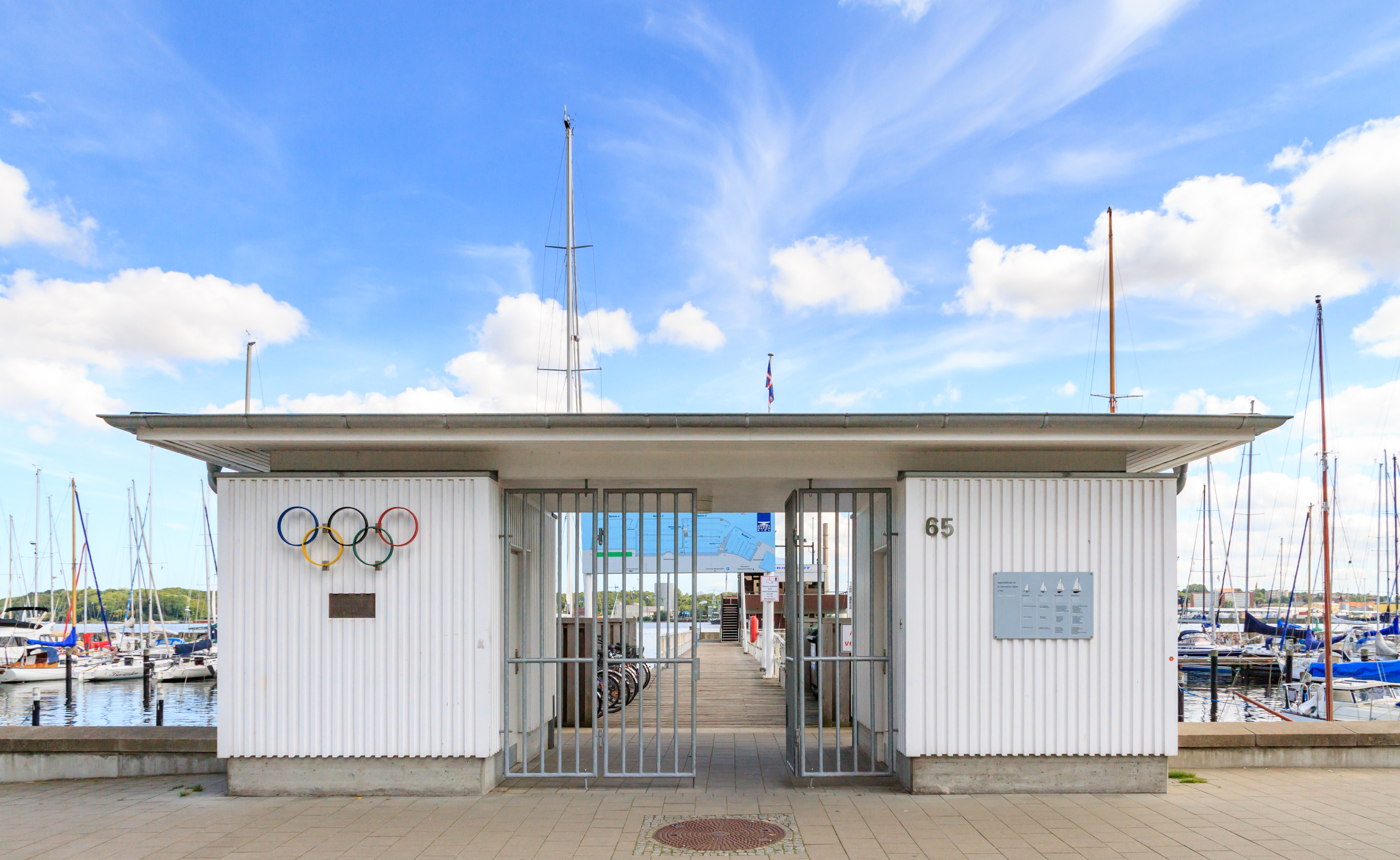 Olympische_Spiele_1936_- Gebäude am Sporthafen Düsternbrook